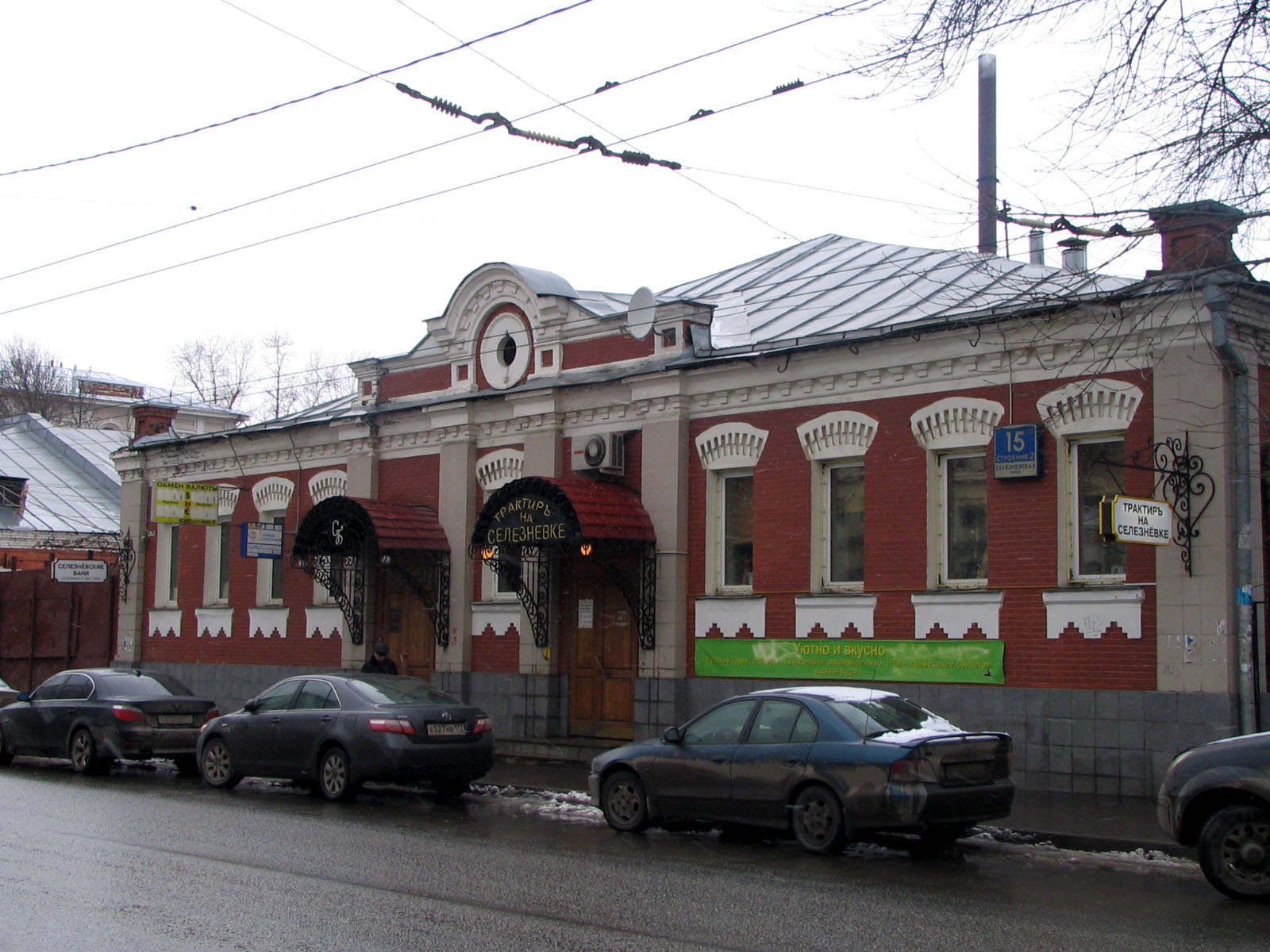 Selezniovskaya Street, 15. Moscow